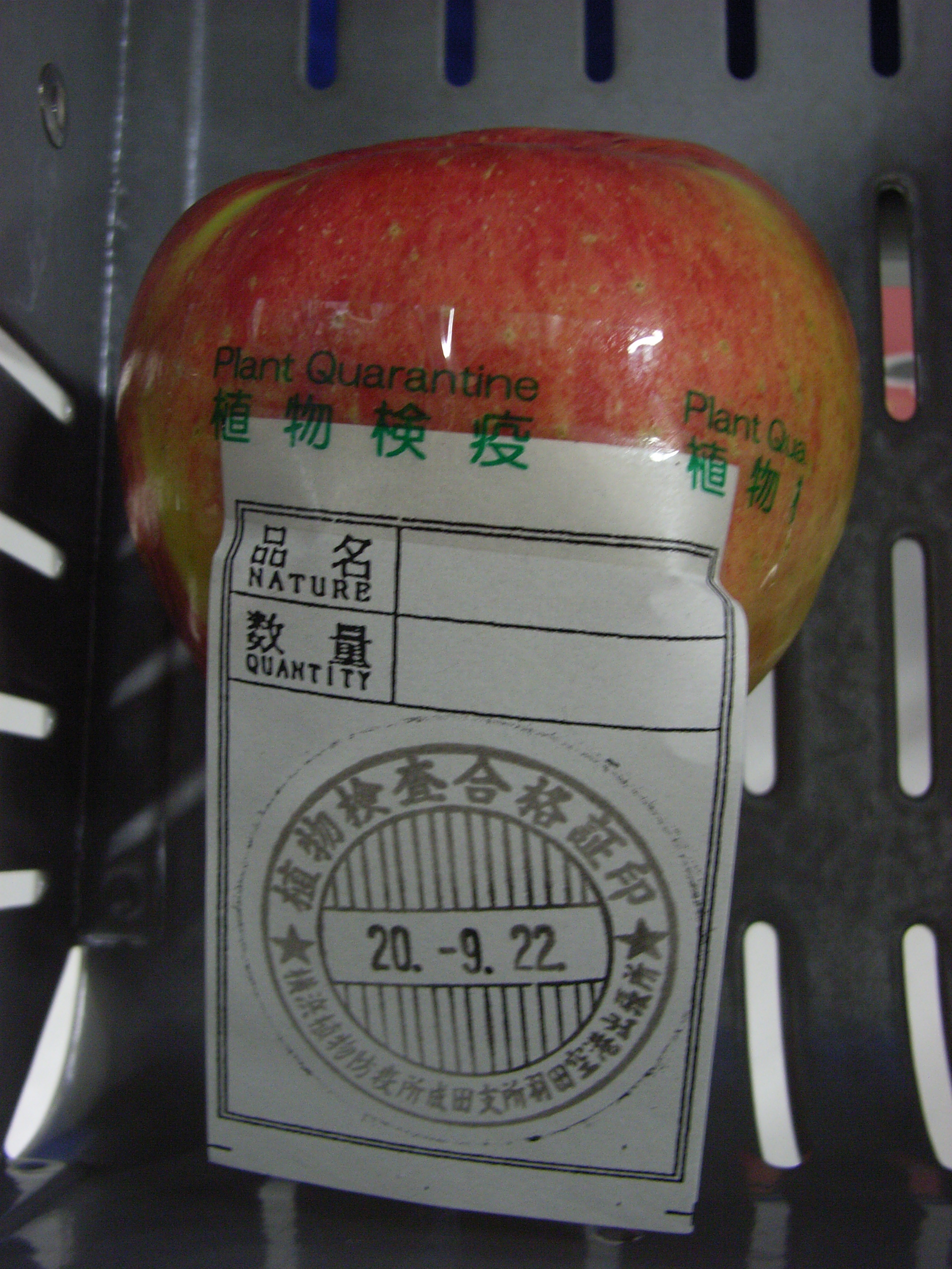 [1] りんごの輸入手続き - ジェトロ